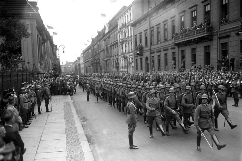 Die grosse Geburtstagsfeier des 85-jährigen Reichspräsidenten von Hindenburg in Berlin ! Parademarsch der Ehrenkompanie vor dem 85 jährigen Reichspräsidenten von Hindenburg (X) in der Wilhelmstraße in Berlin. Information added by Wikimedia users.Ergänzung: Hindenburg steht vor dem Eingang der (Alten) Reichskanzlei, Wilhelmstraße 77. Auf der anderen Straßenseite sieht man den Seitenflügel des Ordenspalais am Wilhelmplatz, in der Weimarer Republik Sitz der Presseabteilung der Reichsregierung. Das Gebäude mit großem Mittelrisalit ist das Preußische Staatsministerium, Wilhelmstraße 63. Der Blick geht nach Norden.